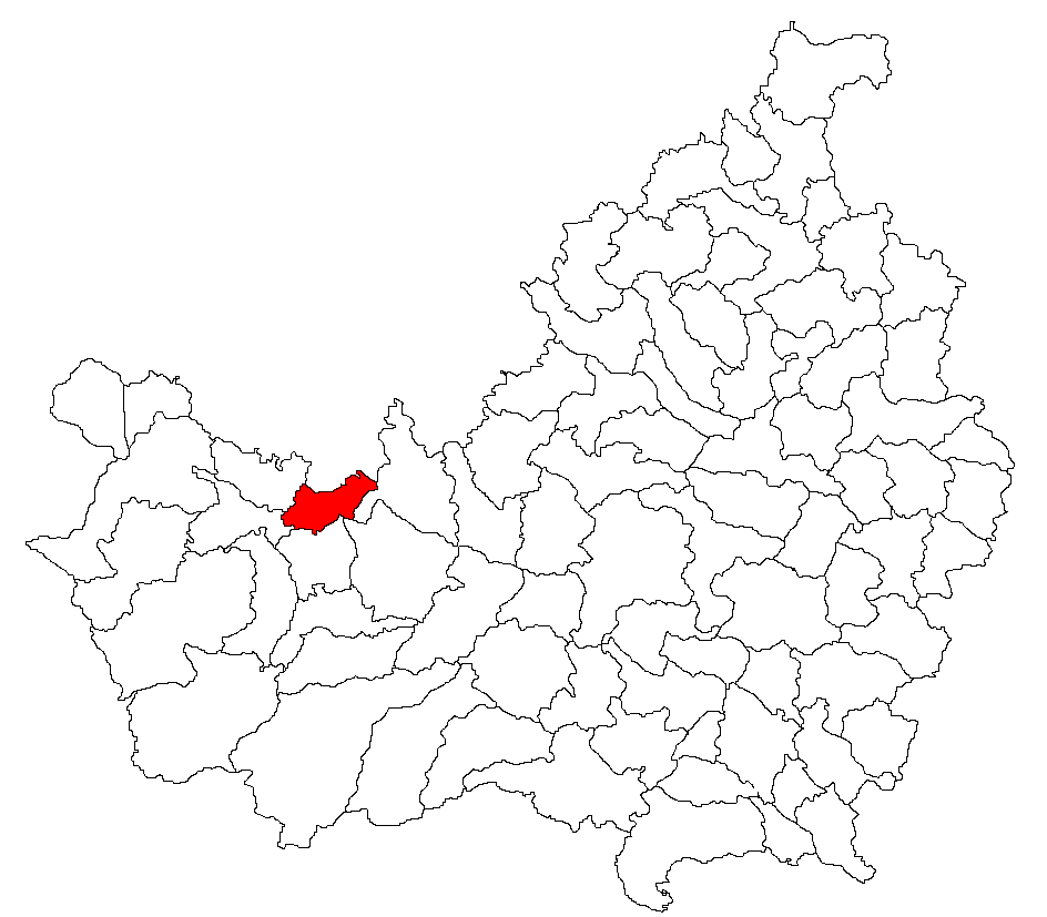 Categorie:Hărţi ale judeţului Cluj